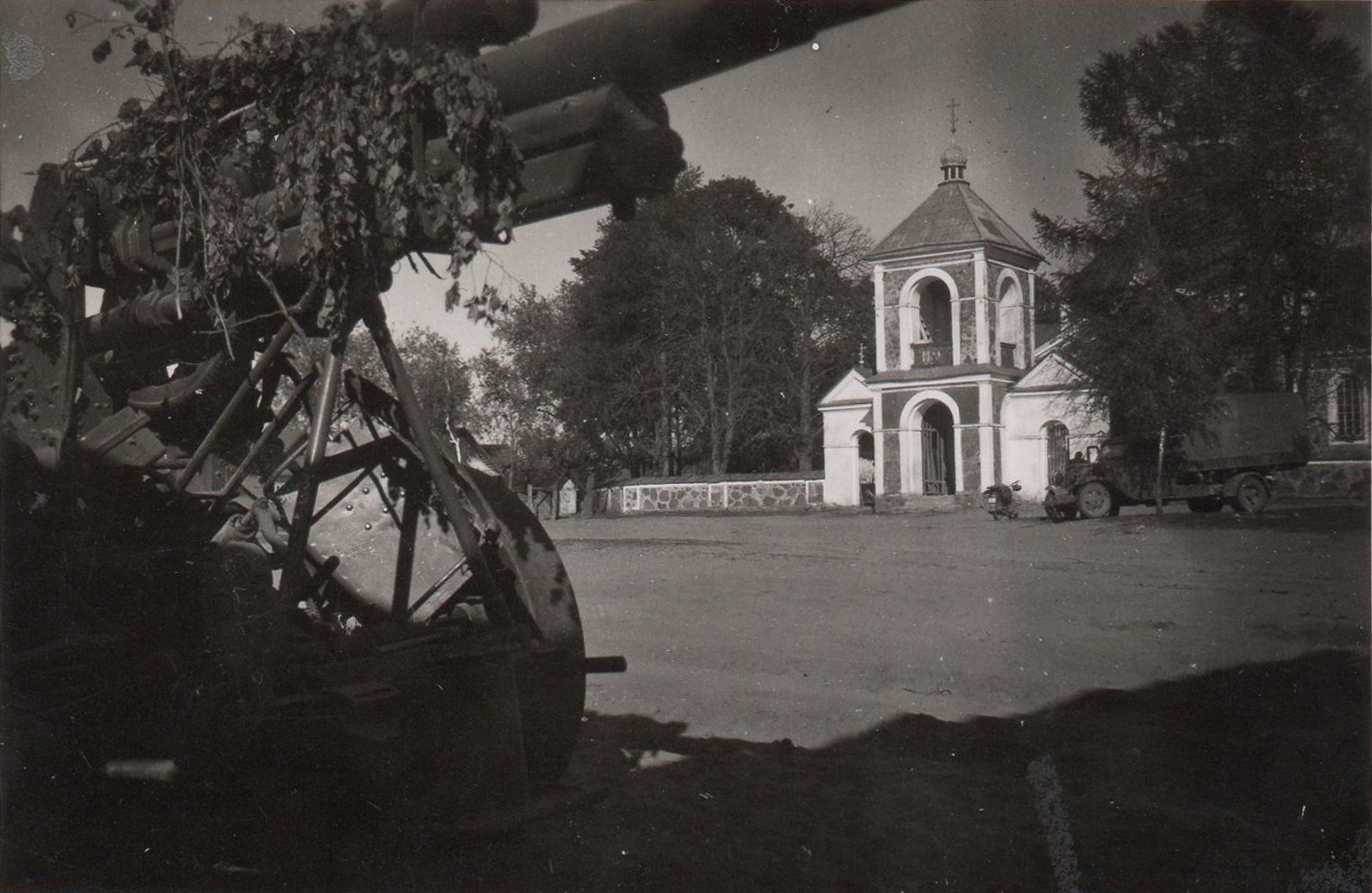 Беларуская (тарашкевіца): Ярэмічы (Jaremičy). Царква